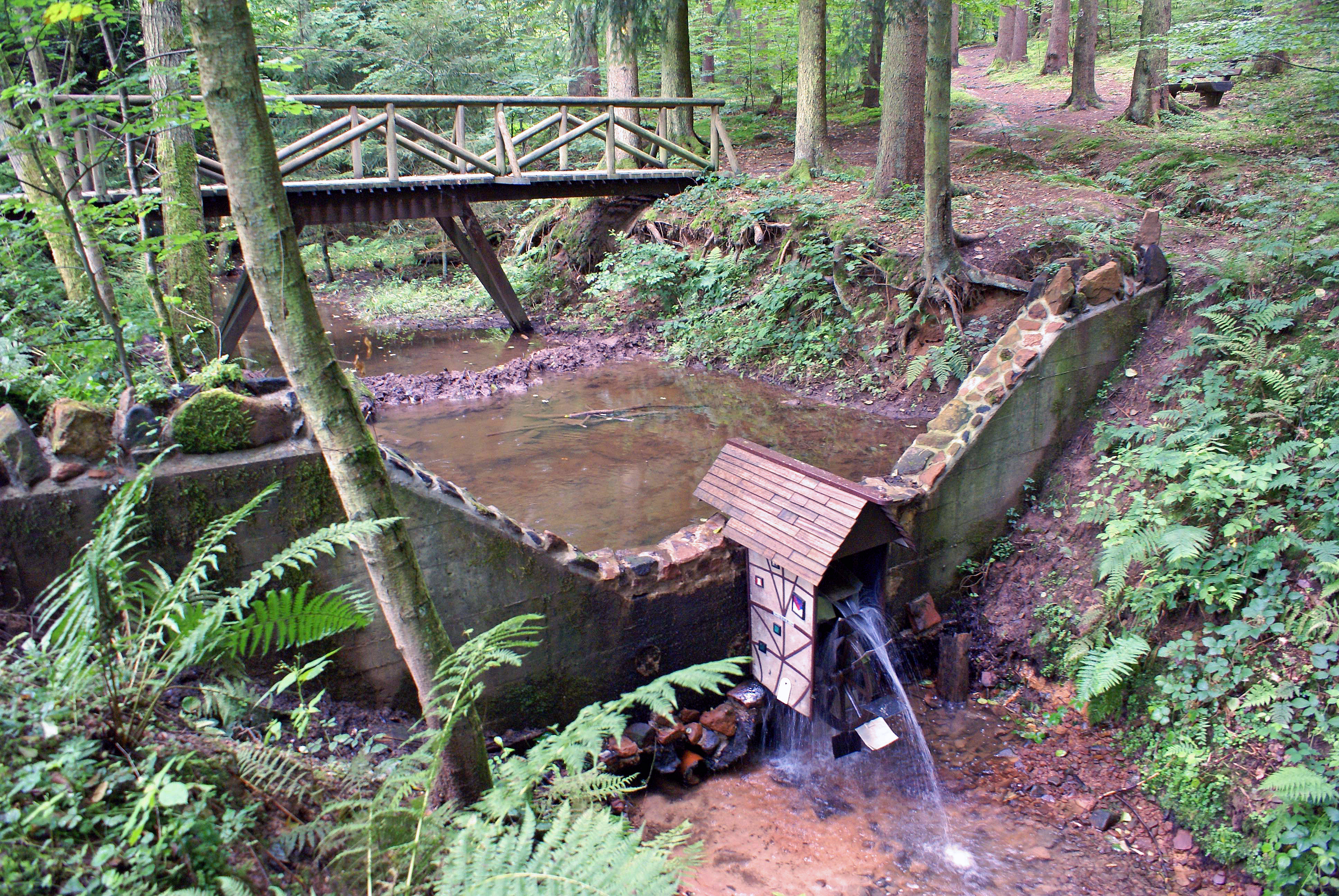 Die Obrunnschlucht ist ein tiefer Taleinschnitt des Obrunnbachs zwischen Höchst im Odenwald und Rimhorn im Odenwaldkreis in Hessen. In ihr befindet sich seit etwa 1920 der Obrunnschlucht-Märchenpfad.